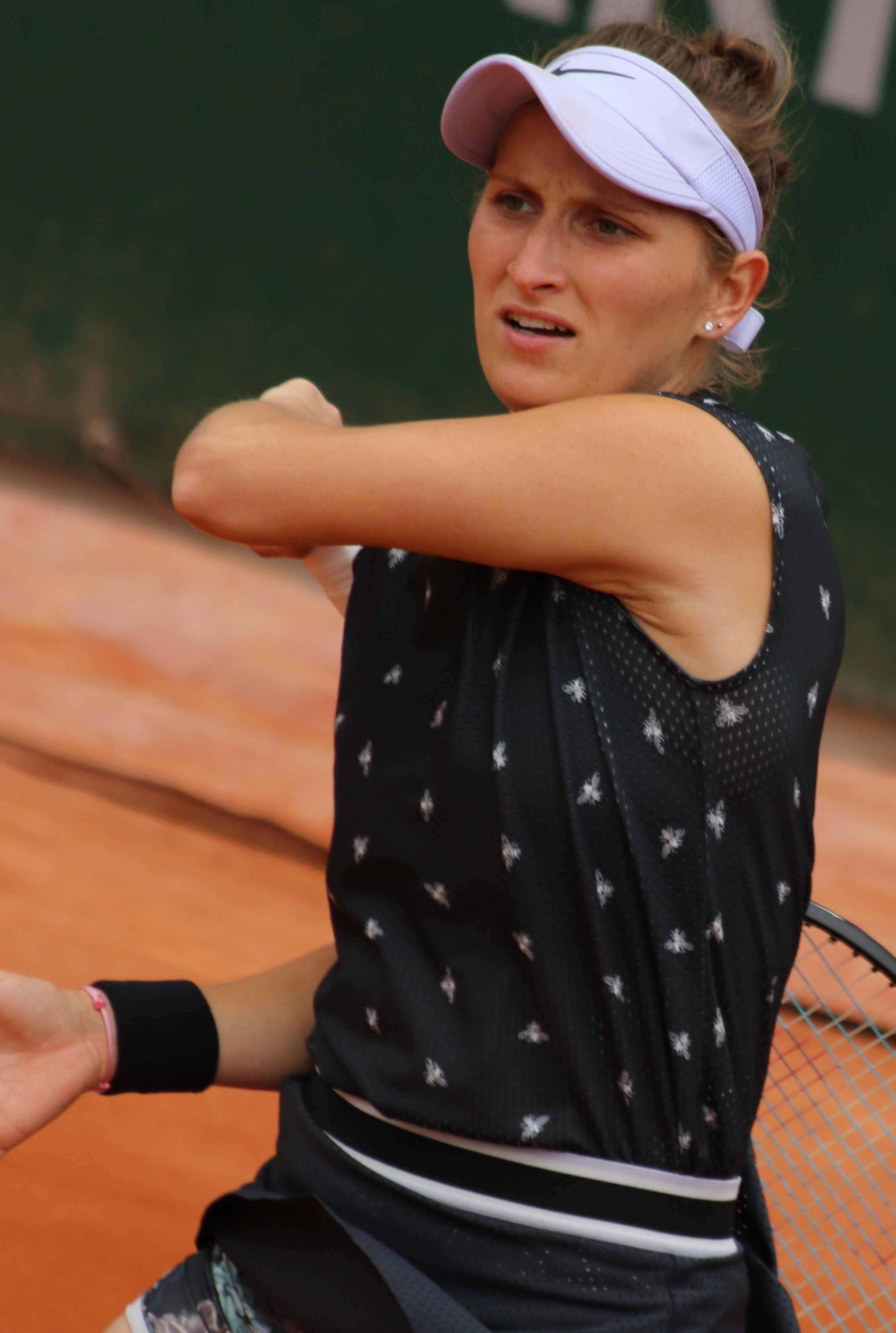 Vondrousova RG19 (26)